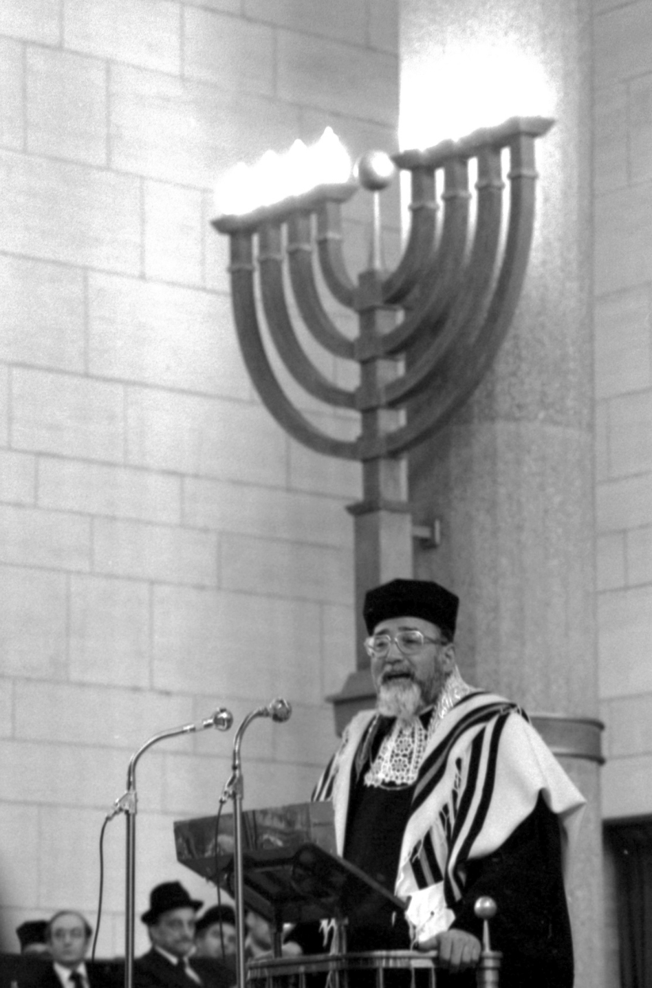 Le grand-rabbin Max Warschawski en chaire à la Grande synagogue de la Paix, 1980. Le grand candélabre est l’œuvre du ferronnier d’art Gilbert Poillerat.